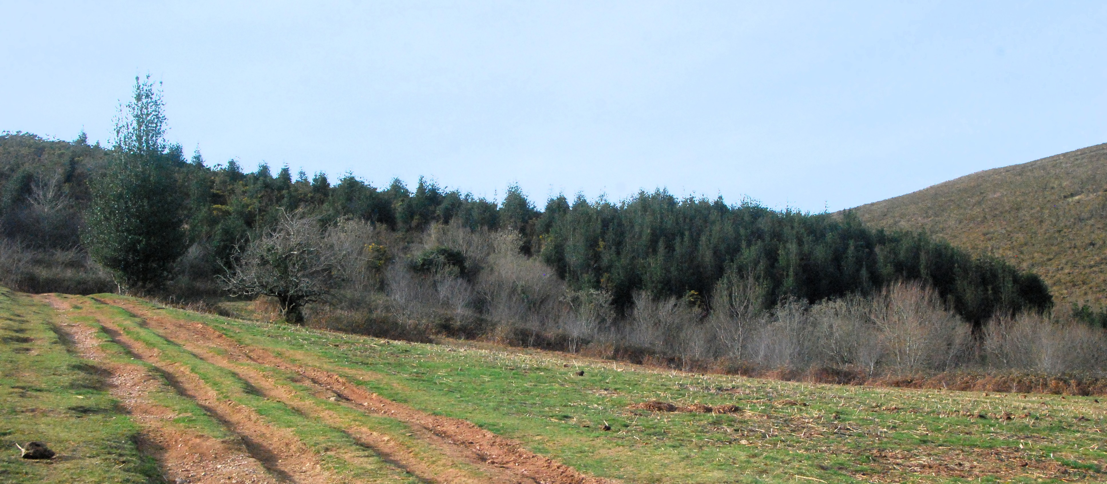 Gorostidia Xolko mendian Osingo zelaian